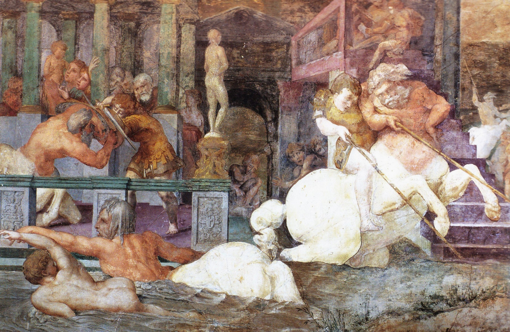 Galleria di Francesco I, educazione di Achille